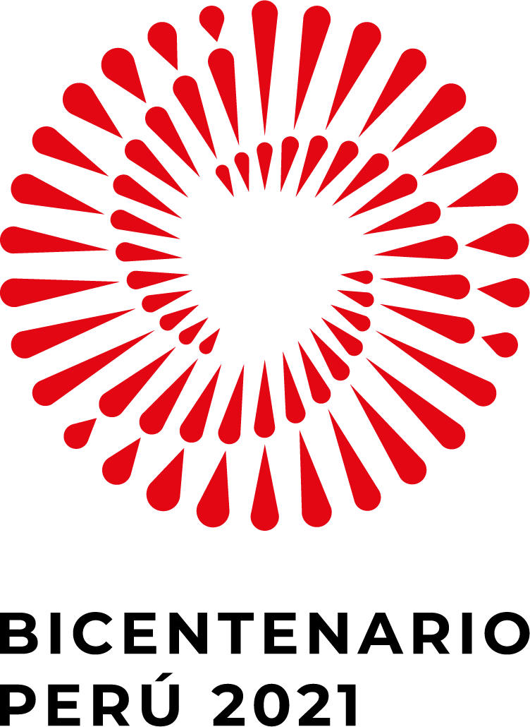 Diseño vertical.